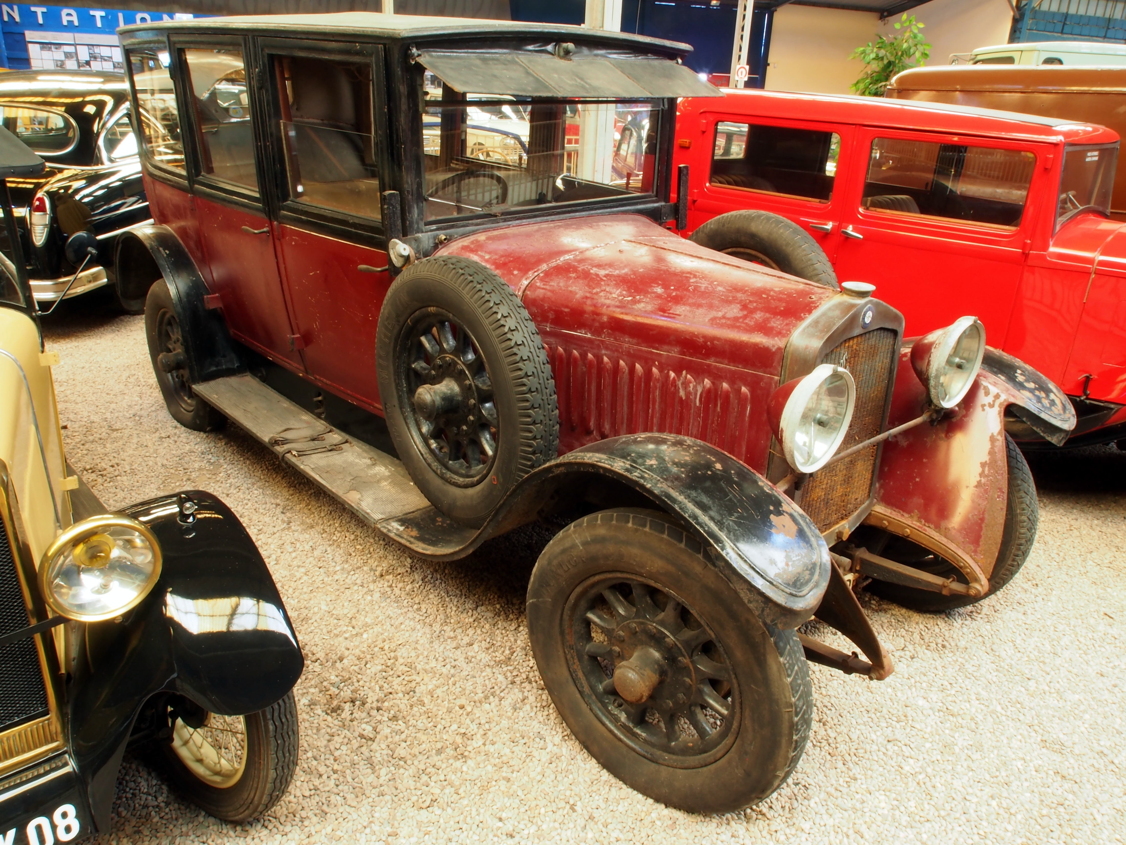 1926 DeDION-Bouton IW.